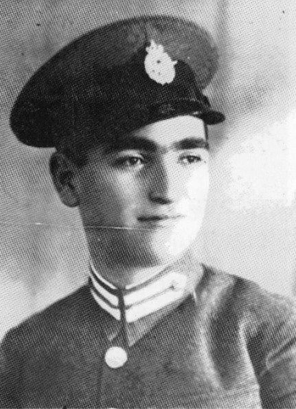 Григорис Валканас (греч. Γρηγόρης Βαλκανάς ; 1916 — 18 ноября 1940) — греческий военный лётчик времён Второй мировой войны.